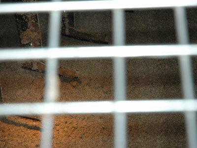 在發泡桶中攪拌著的麥芽 經過輾碎去除榖殼後的大麥芽會被倒進巨大的發泡桶(Mash Tun)中，注入熱水以便將麥芽中的澱粉溶解轉化為可供後續發酵程序所需的醣分。 本圖片由上傳者User:SElephant拍攝於2004年8月。